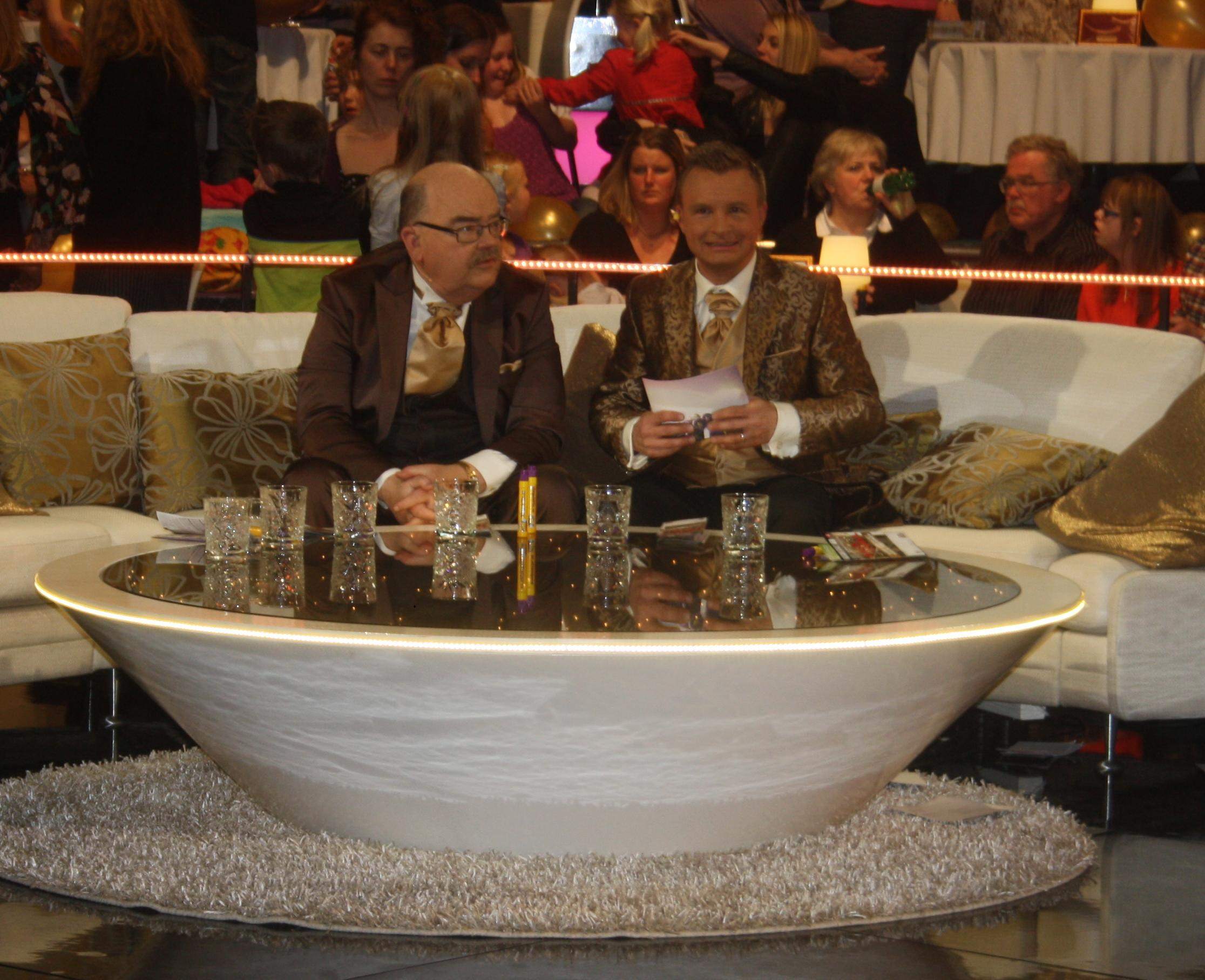 Loket och Jan Bylund sitter i soffan på Bingolottos guldkväll